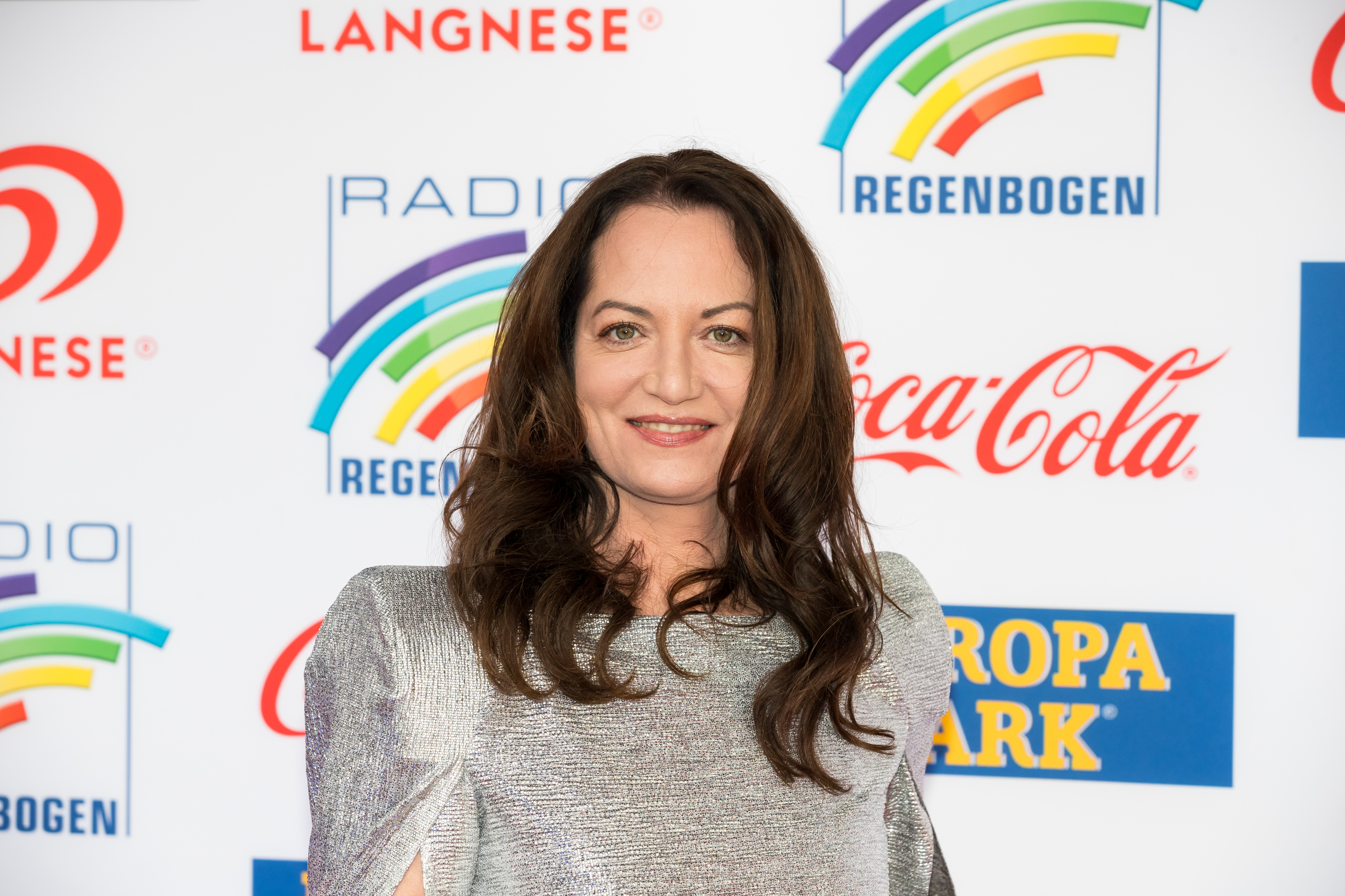 Natalia Wörner during Radio Regenbogen Award 2019 at Europapark, Rust, Baden-Württemberg, Germany on 2019-04-12, Photo: Sven Mandel